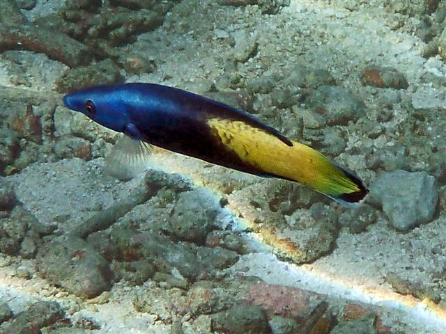 Labroides bicolor, Maldives, Mirihi, Jan. 2012